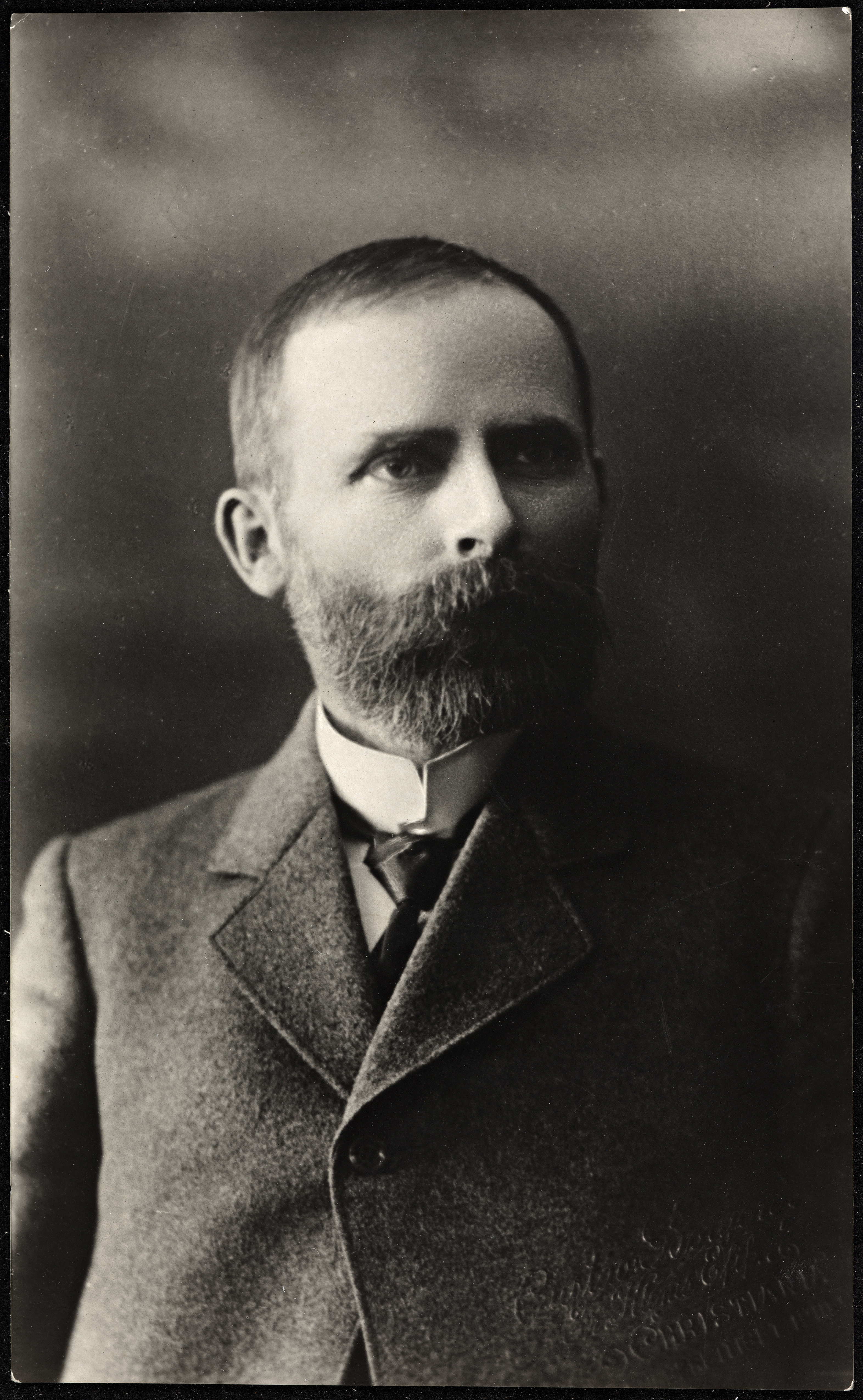 Beskrivelse / Description: Postkort / postcard. Rasmus Steinsvik var redaktør og forfatter. Dato / Date: ukjent / unknown Fotograf / Photographer: Gustav Borgen (Christiania) Digital kopi av original / Digital copy of original: fotokjemisk postkort, s/h Eier / Owner Institution: Nasjonalbiblioteket / National Library of Norway Lenke / Link: Bildesignatur / Image Number: blds_06208